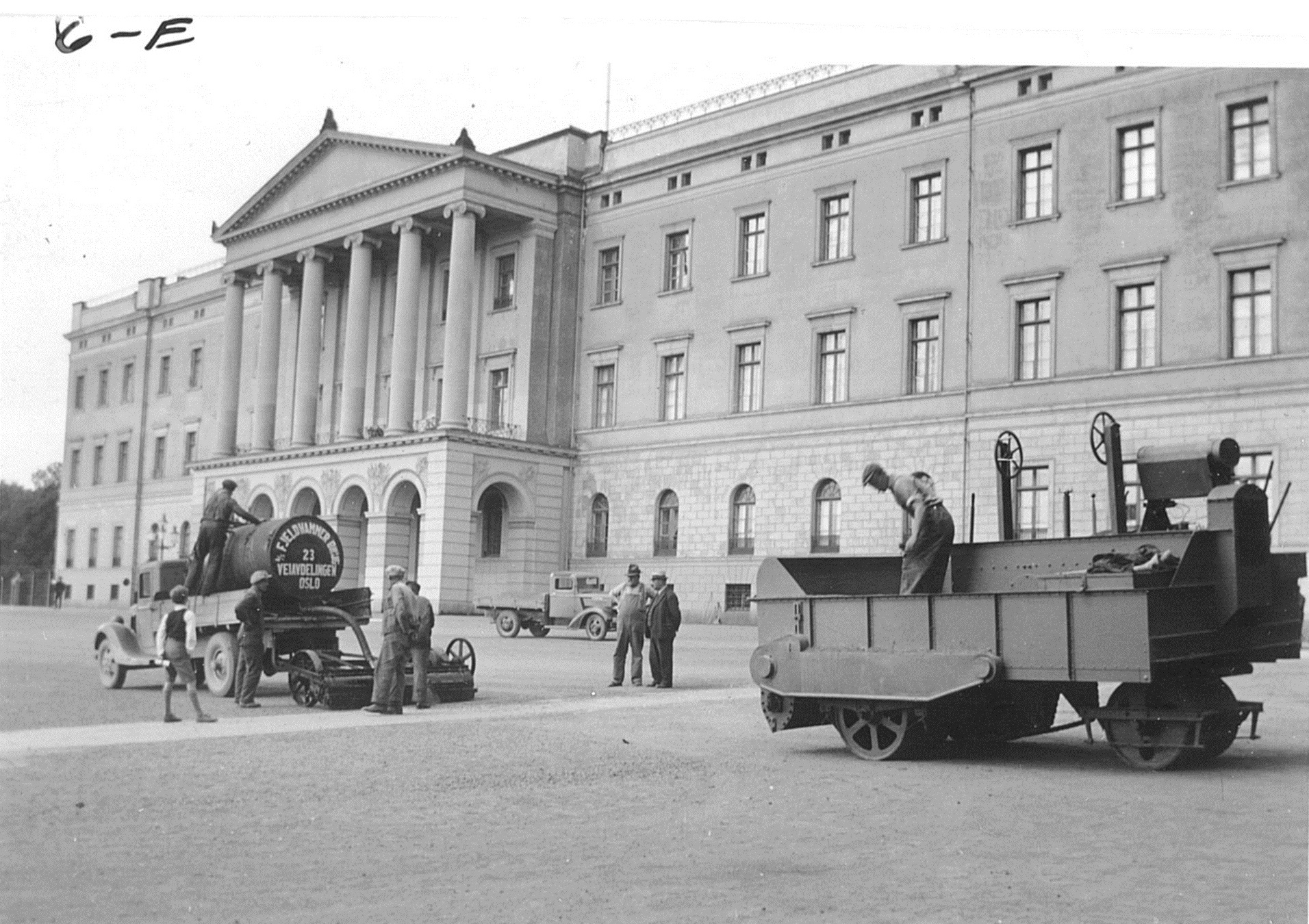 Arbeider på Slottet 1938.